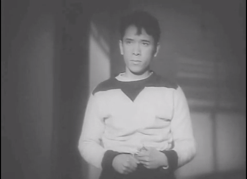 『非常線の女』、1933年